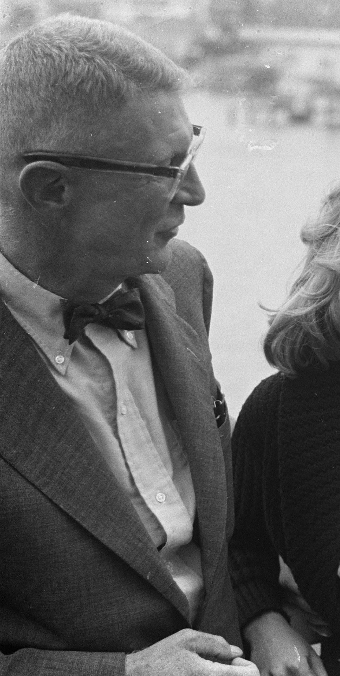 Cocktailparty Stephen Boyd en Dolores Hart . Philip Dun[ne] , Dolores Hart en Stephen Boyd